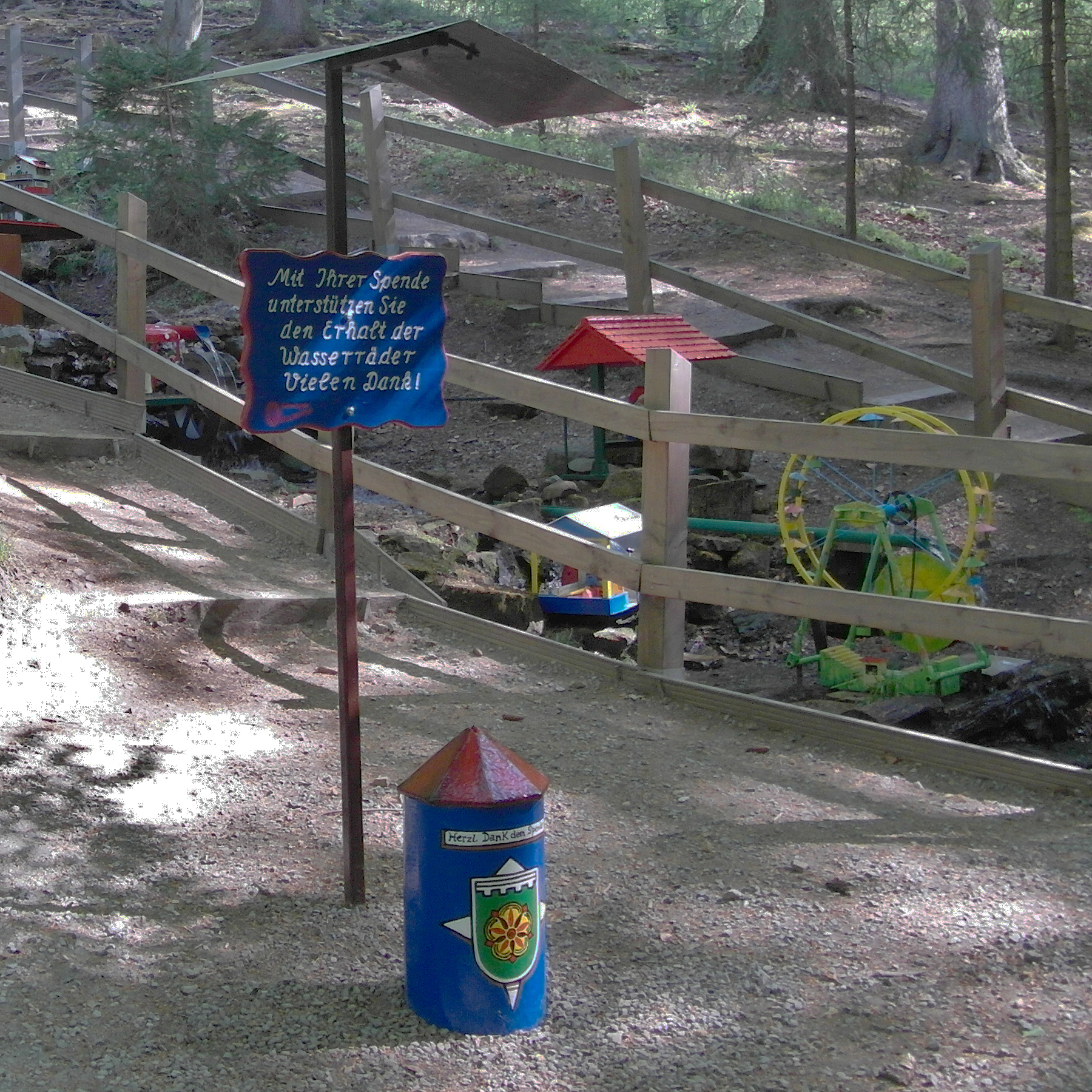 Die Modelle der Wennigser Wasserräder werden jährlich in oft überarbeitetem Design aufgebaut .Von den 1960ern bis 2013 wurden hier zur Instandhaltung Spenden gesammelt